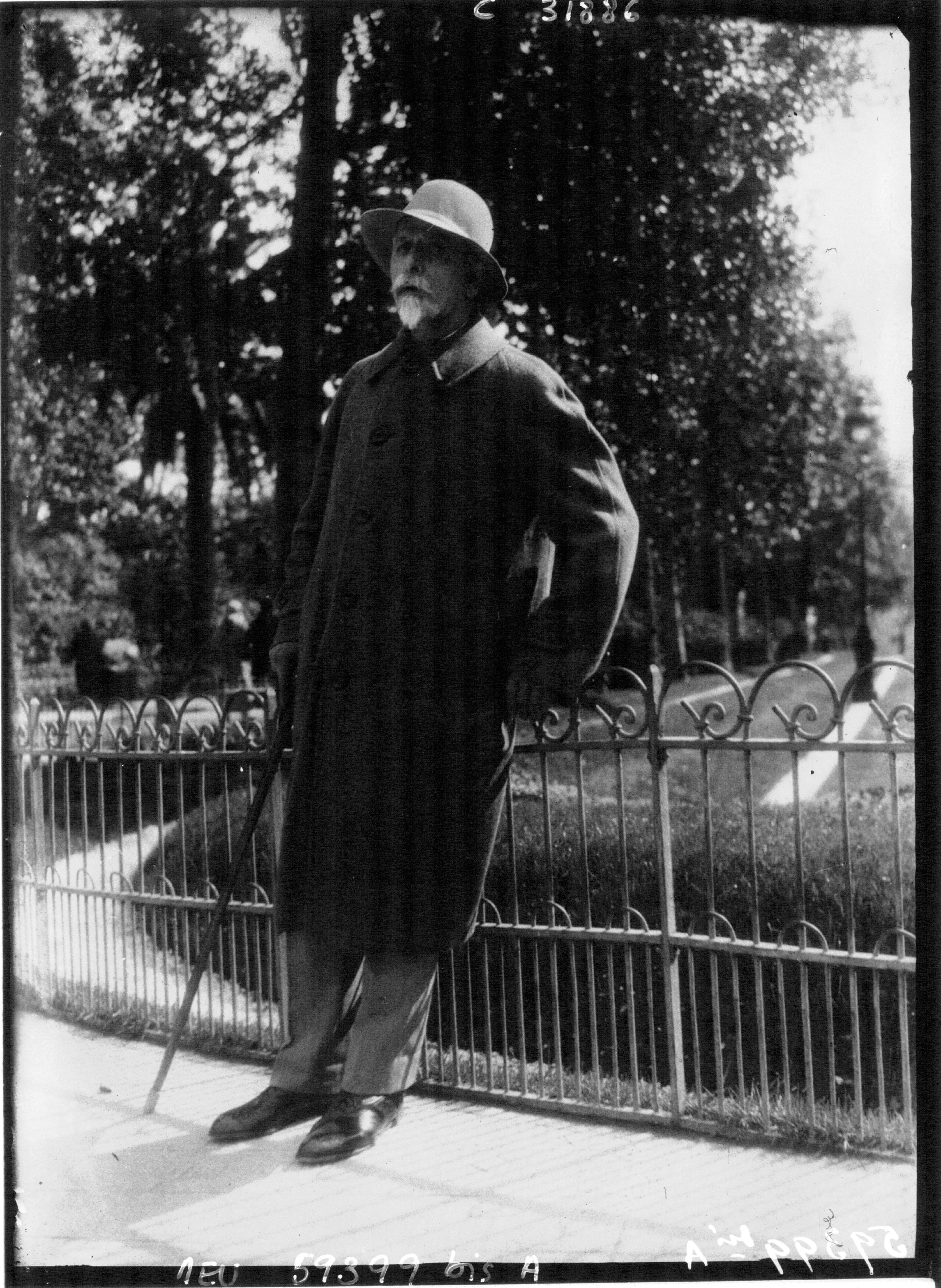 Basil Zaharoff (portrait en pied) : [photographie de presse]